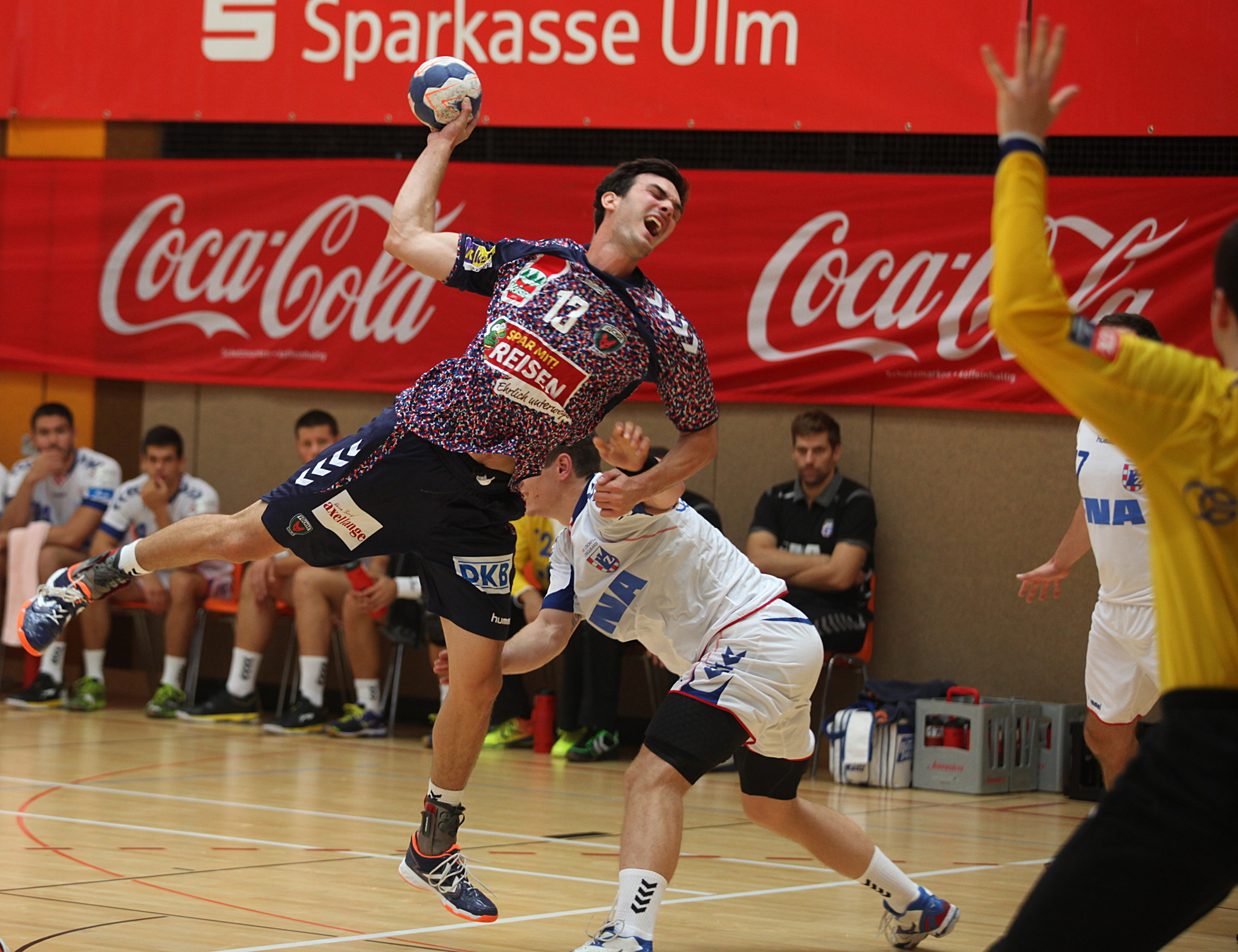 Petar Nenadić, Spieler der Füchse Berlin am 16. August 2014 im Spiel gegen RK Zagreb beim Sparkassen-Cup in Ehingen.